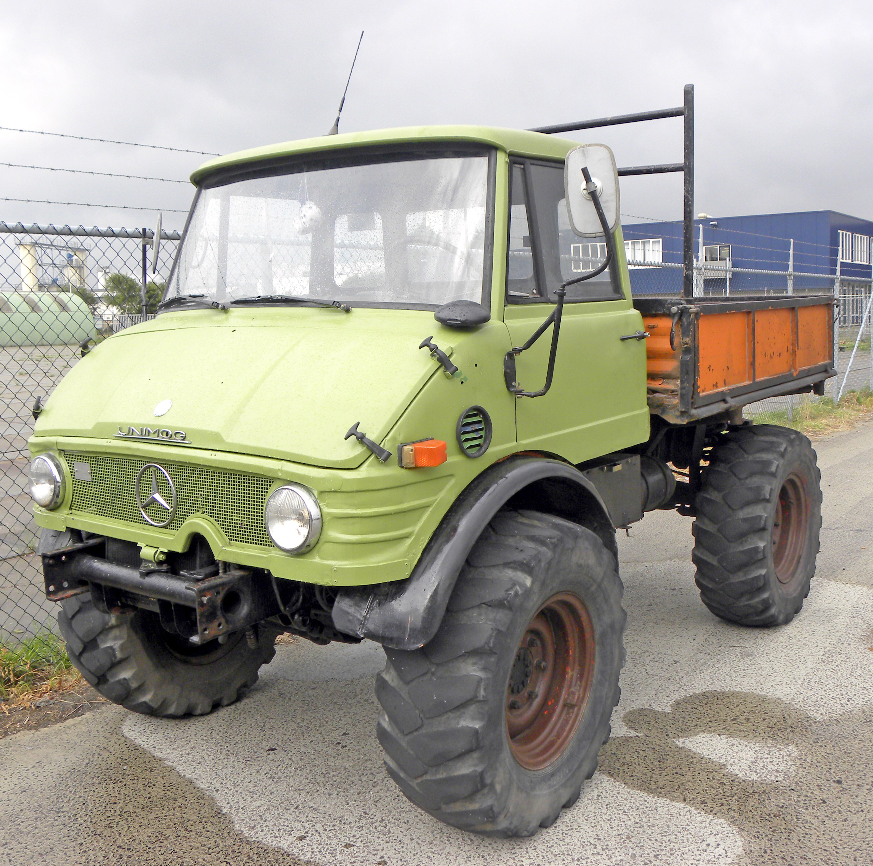 Unimog 302